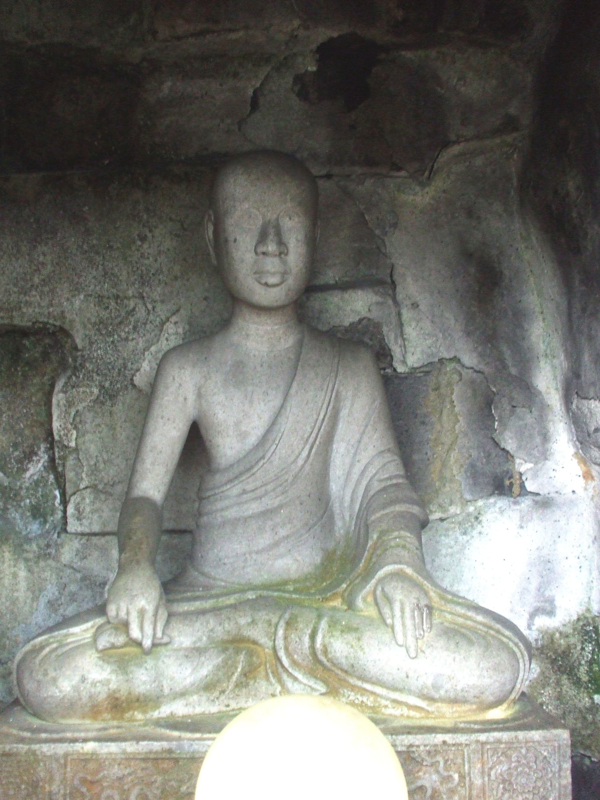 Tượng Giác Hoàng Trần Nhân Tông đặt trong tháp Huệ Quang (núi Yên Tử, Quang Ninh). Bệ và tượng được tạc trên cùng một khối đá vào đời Trần.